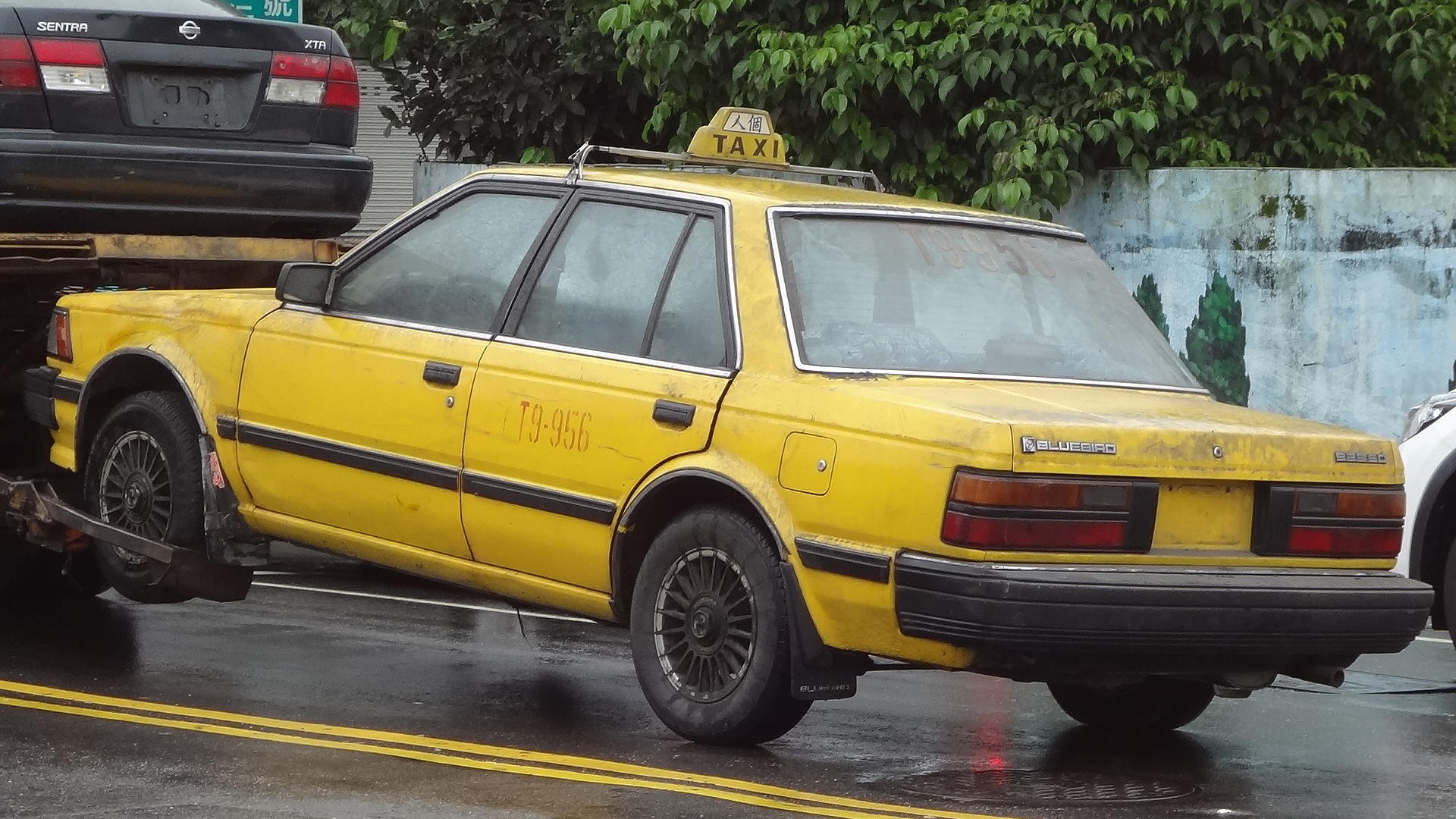 雨中的基隆市七堵區工建西路，已拆牌的裕隆青鳥923SD計程車T9-956被拖吊。